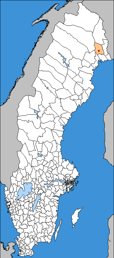 Överkalix kommun ,Sweden